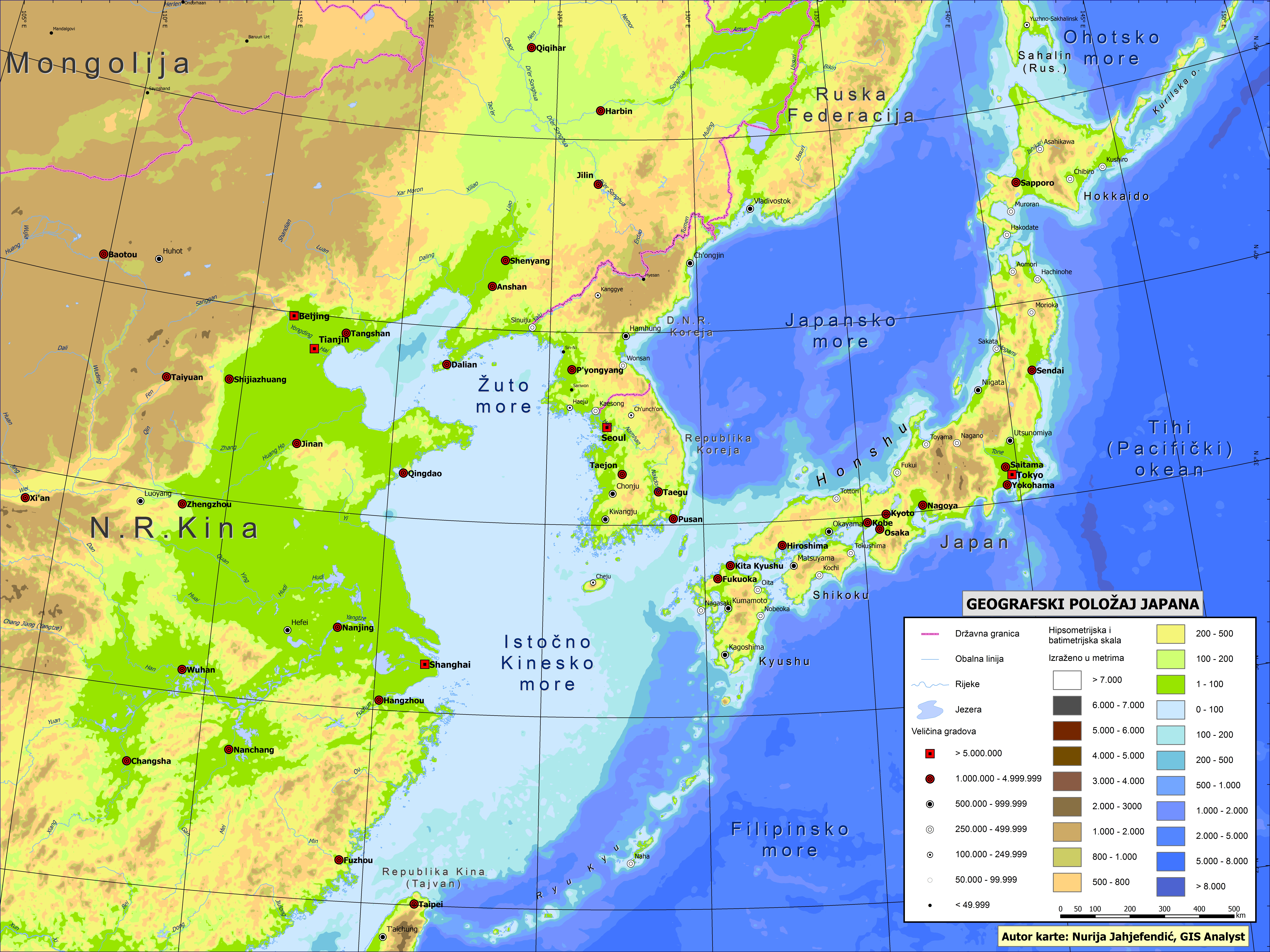 Geografski položaj Japana u Istočnoj Aziji